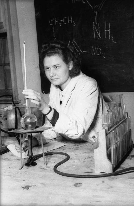 Schülerin bei Chemieversuch Die Schülerin Ursula Kühne von der Vorstudienanstalt bei einem chemischen Versuch. Aufn. Illus/Rudolph 3115-49